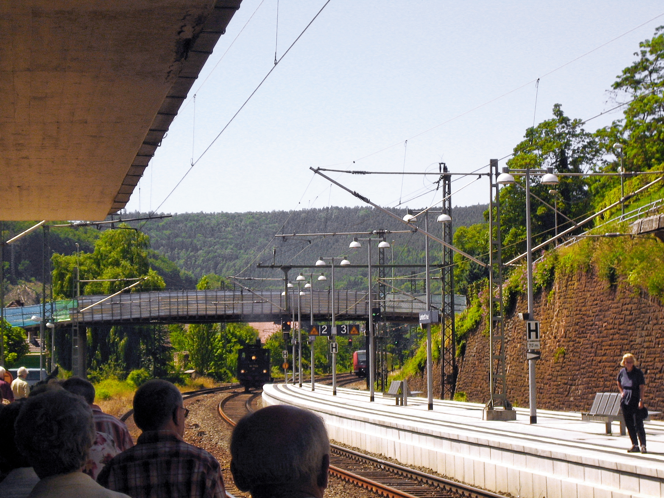 Bahnhof Lambrecht, selbst fotografiert